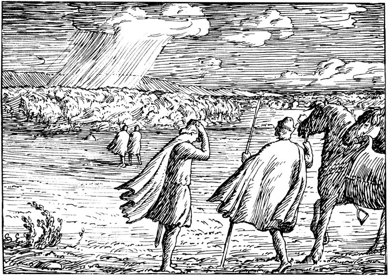 Halfdan Egedius: Illustration for Magnus den godes saga. Snorre 1899-edition. «Kong Magnus og Kalv Arnesøn paa Stiklestad.» nb: «Kong Magnus og Kalv Arnesson på Stiklestad.» nn: «Kong Magnus og Kalv Arnesson på Stiklestad.»